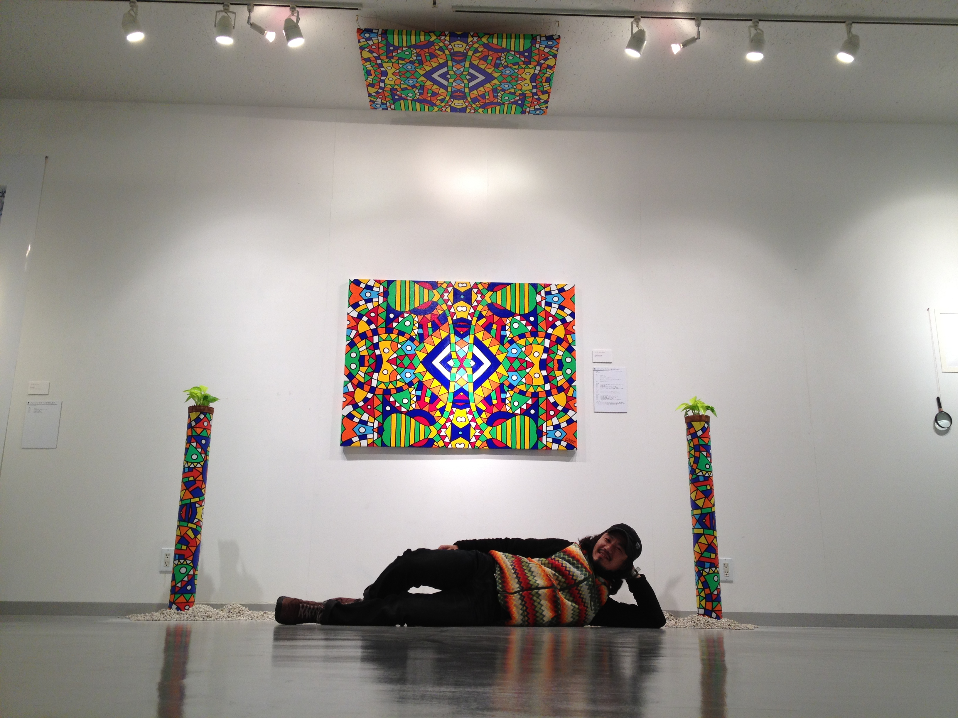 art Work of Nobuhiro Ohmatsu